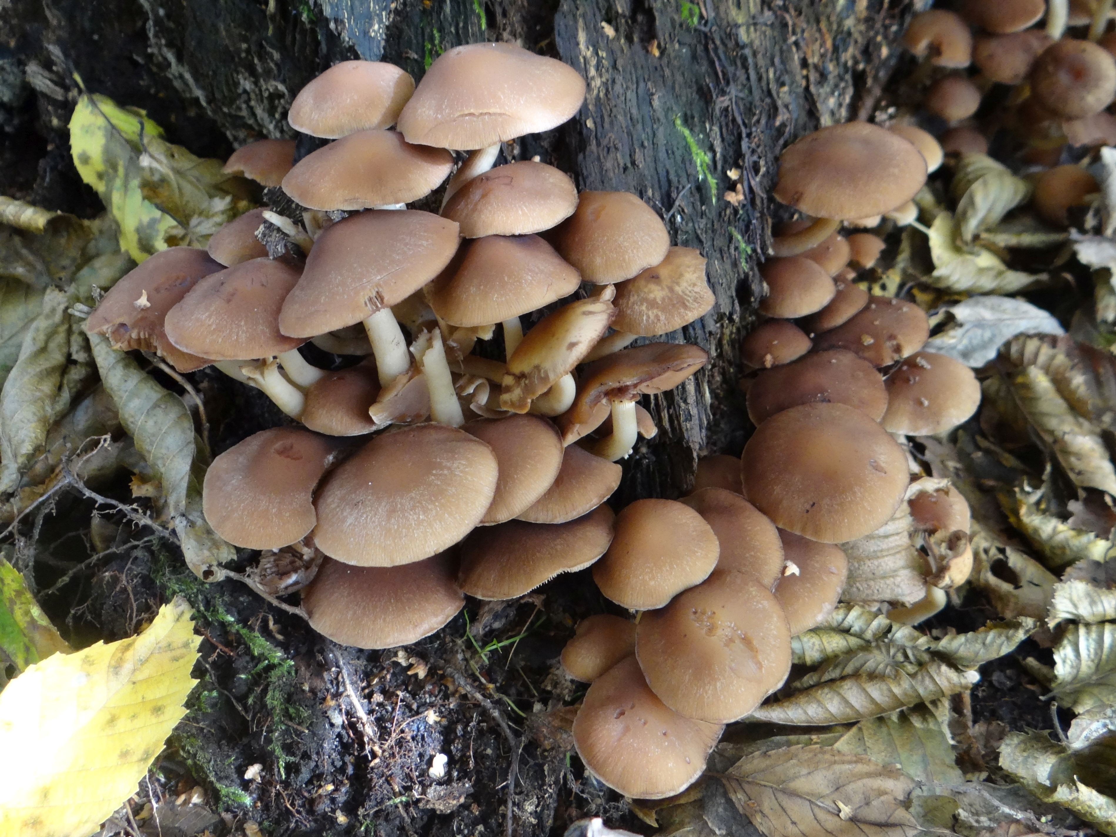 Psathyrella piluliformis (location: Poland, Kamionna (województwo małopolskie)